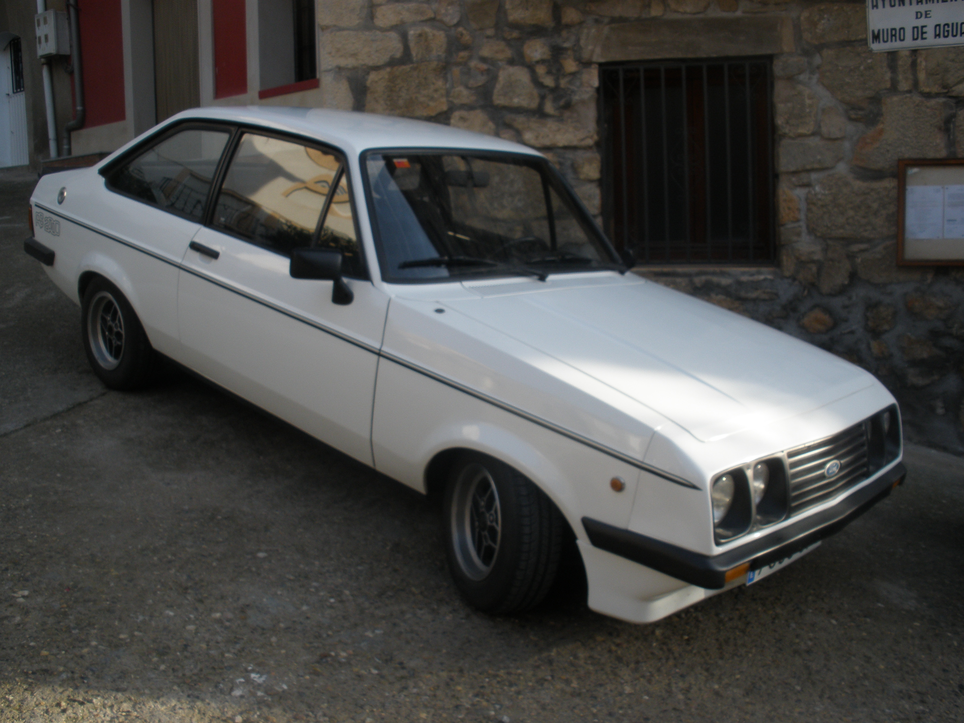 Subida de Muro de Aguas, 09 nov 2008 (rally) - Calle Ancha